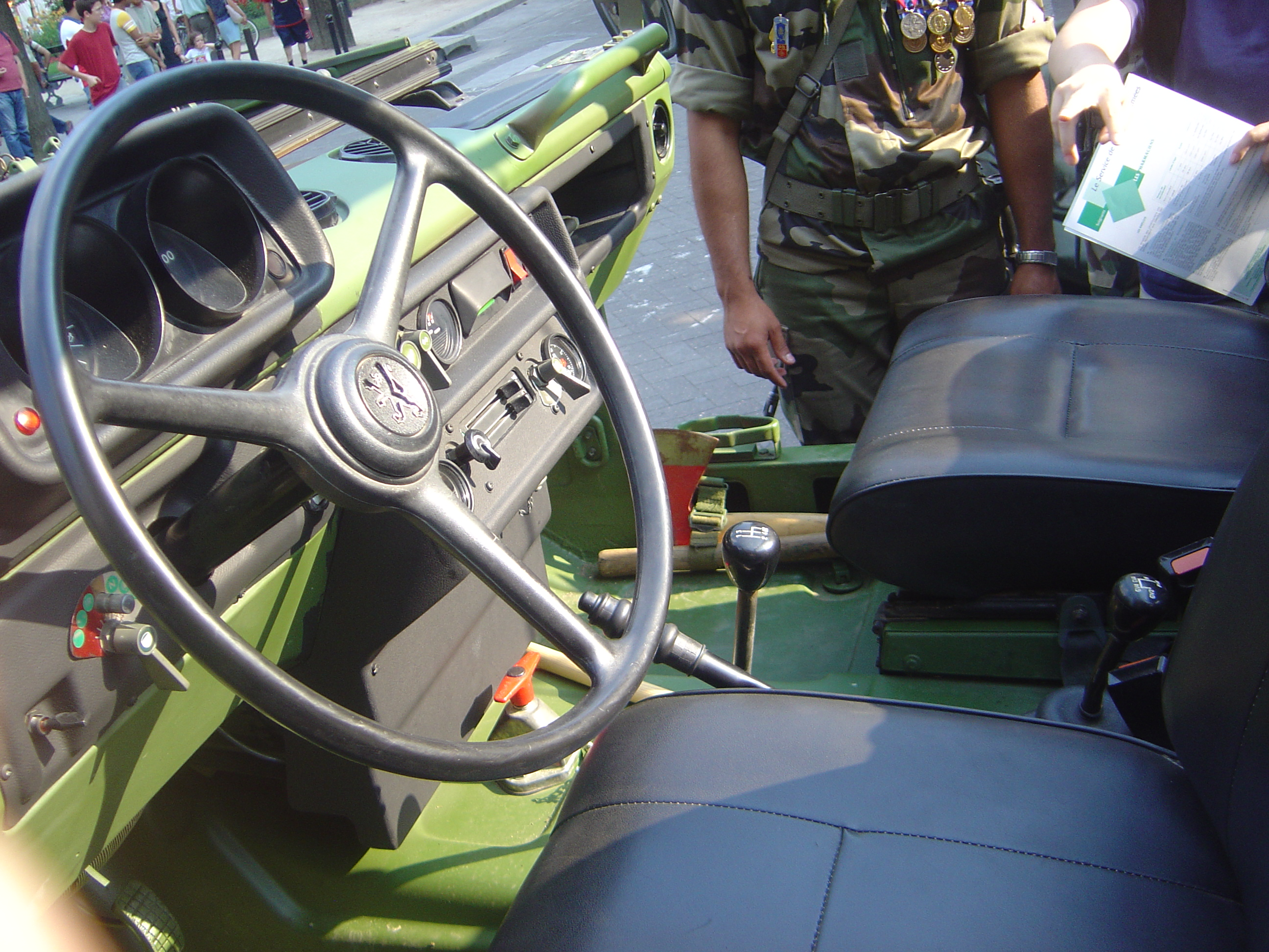 Peugeot P4 driving seat